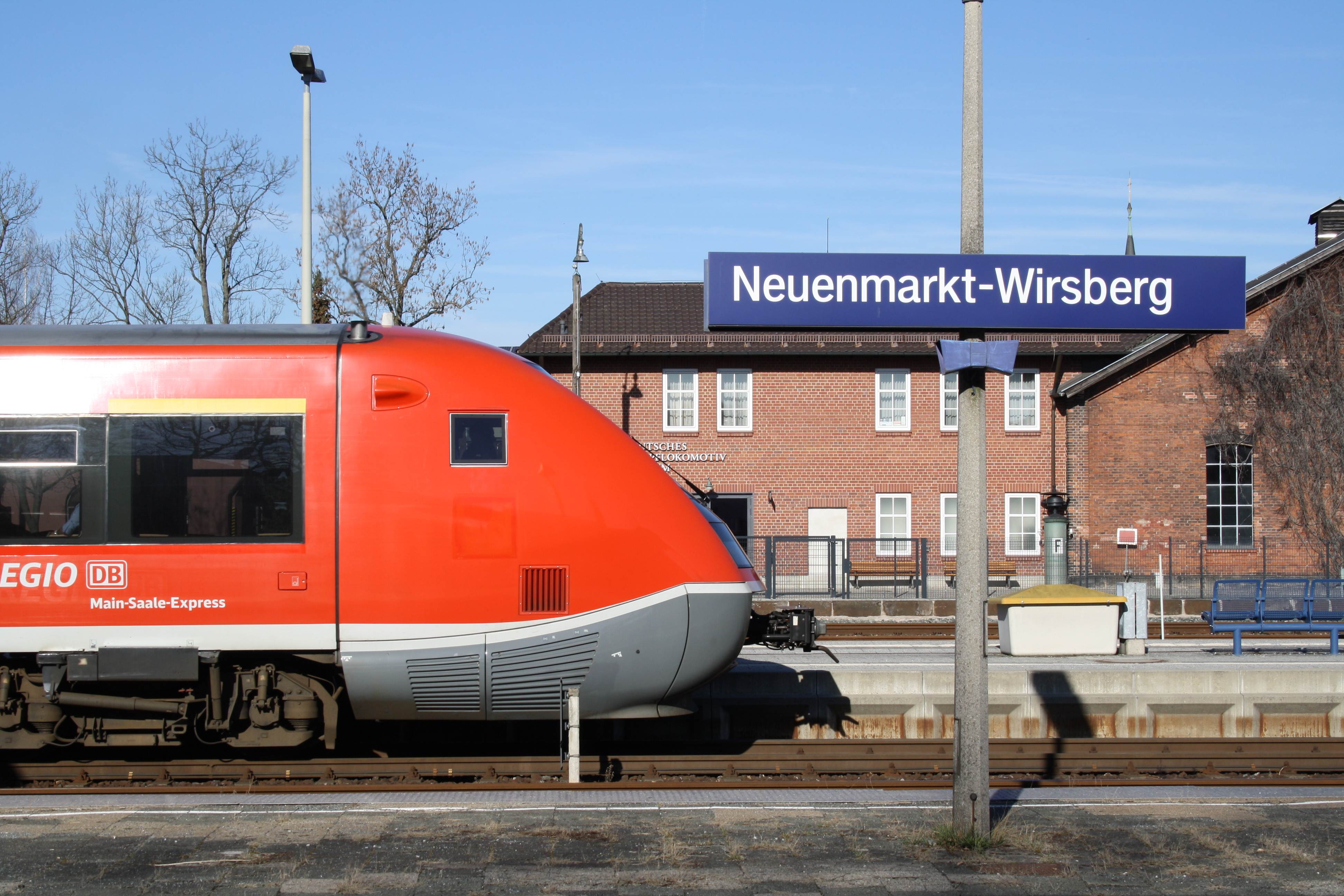 "Baleine" im Bahnhof Neuenmarkt-Wirsberg